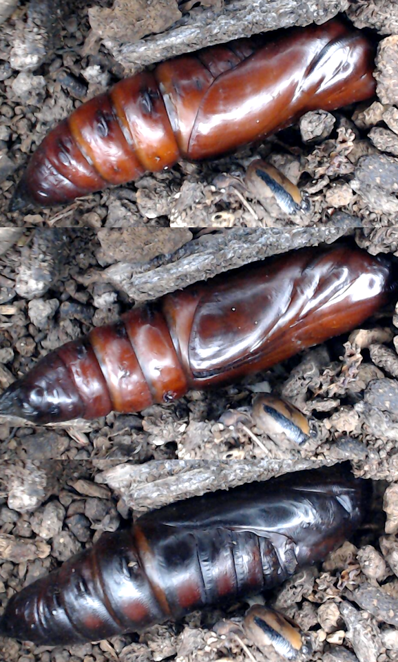 Verfärbung der Puppe kurz vor dem Schlupf: 3 Tage, 2 Tage und 1 Tag vor dem Schlupf aufgenommen.